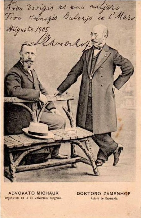 Alfred Michaux kaj Zamenhof en poŝtkarto eldonita ĉ. 1906 kun faksimila aŭtografo